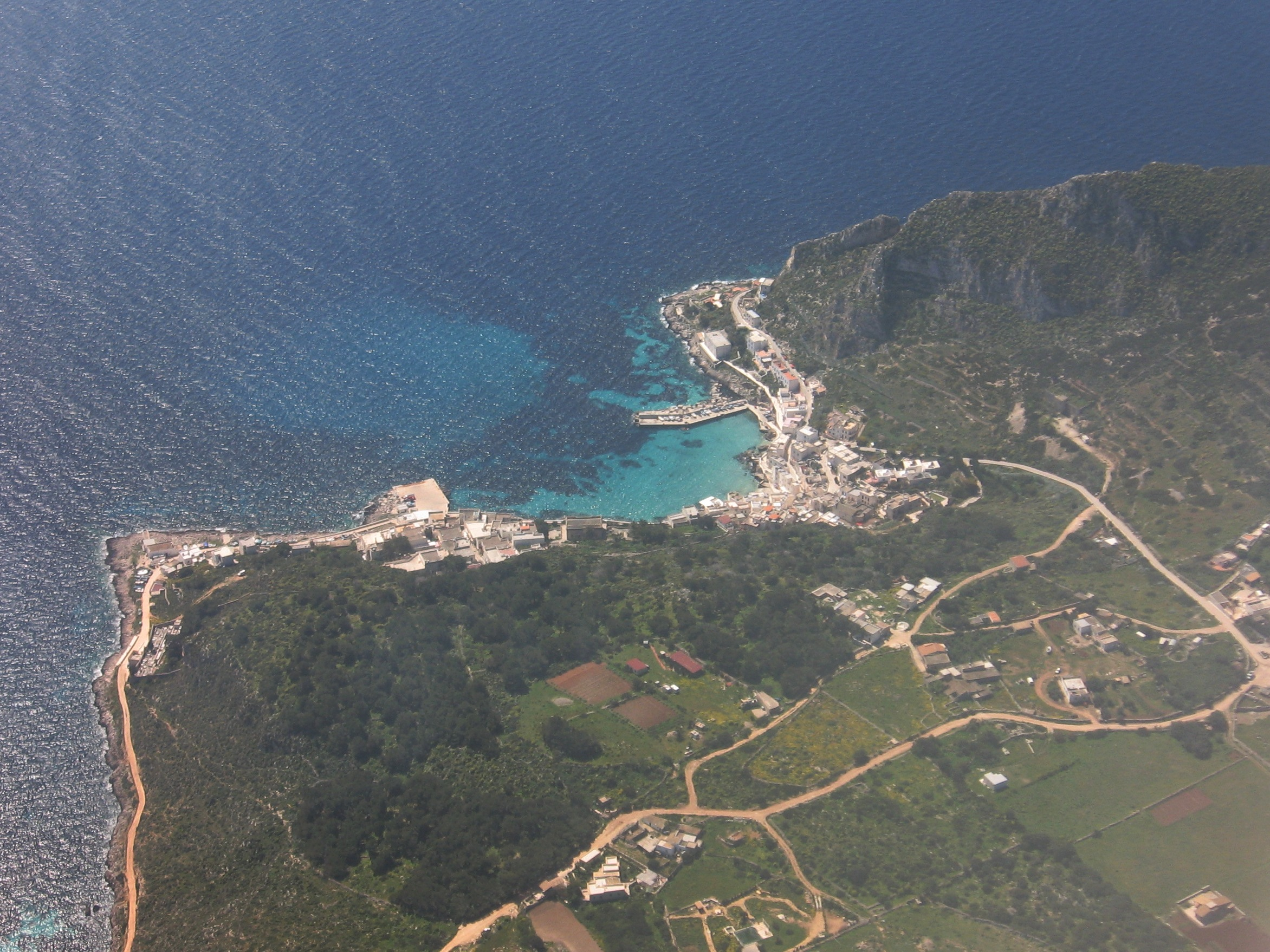 Small port of Levanzo